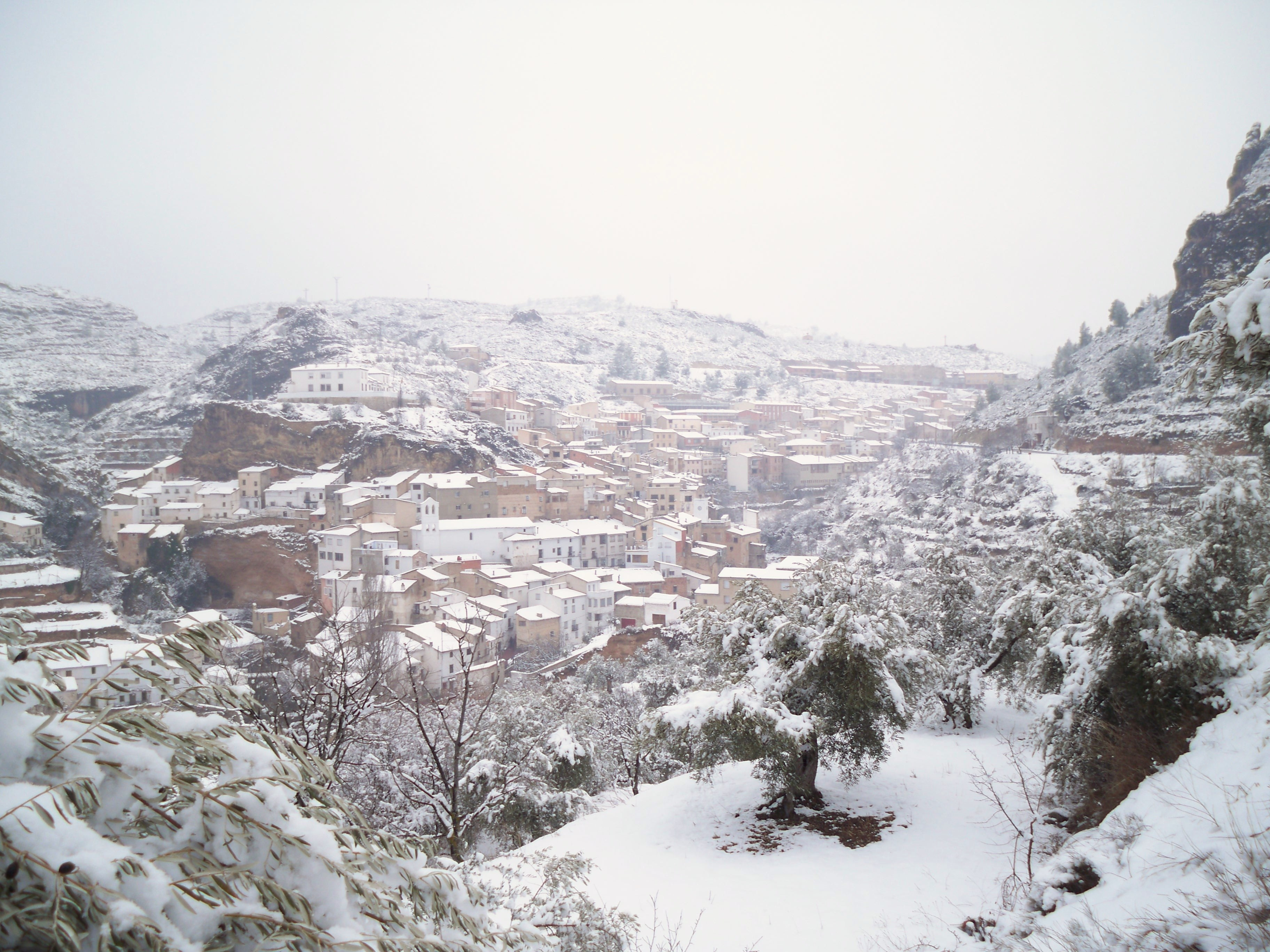 Nevada febrero 2010 en el casco antiguo de Molinicos (Albacete)